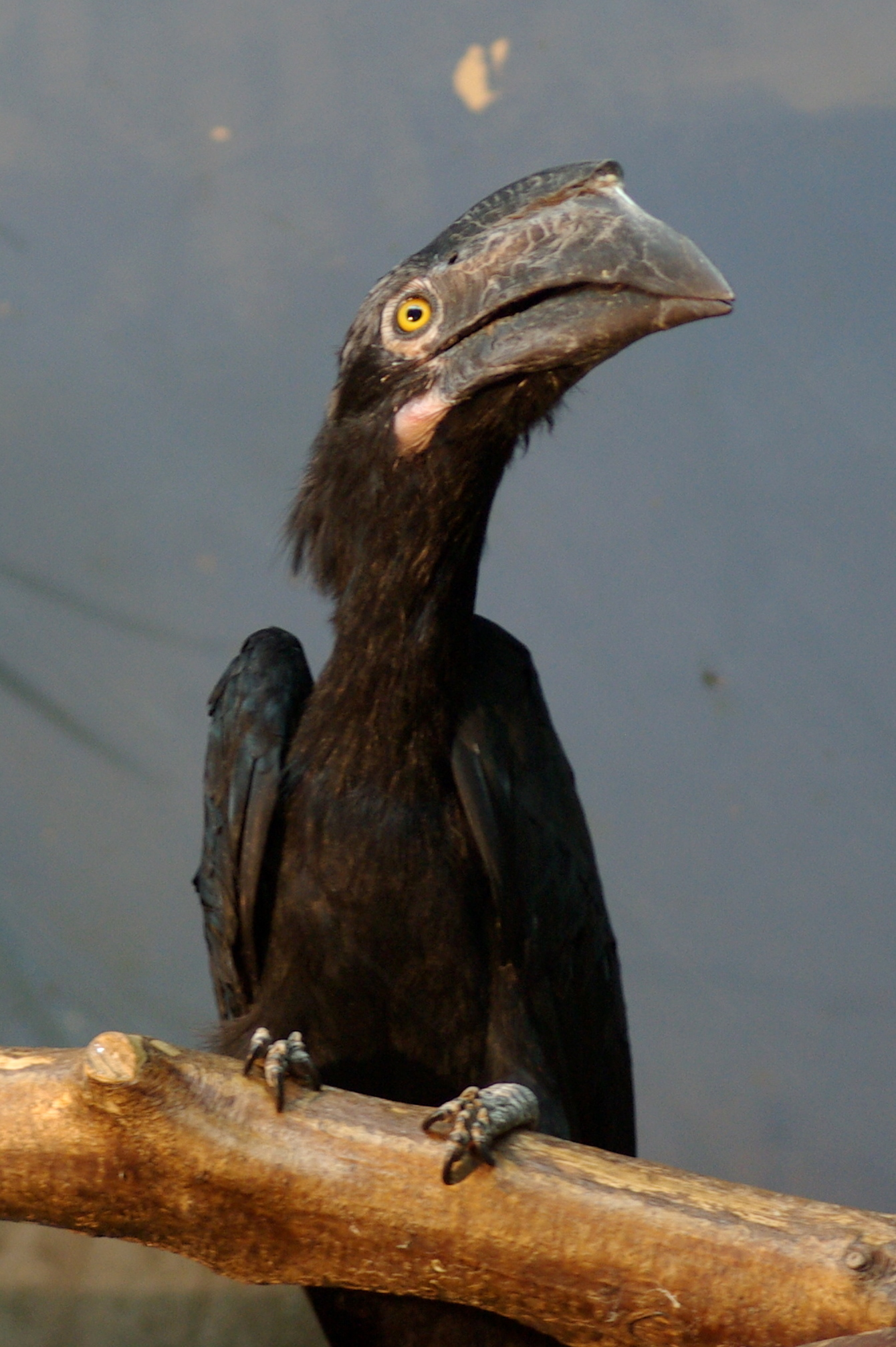 Malaien Hornvogel(Anthracoceros malayanus), weiblich/female, Zoo Saarbrücken